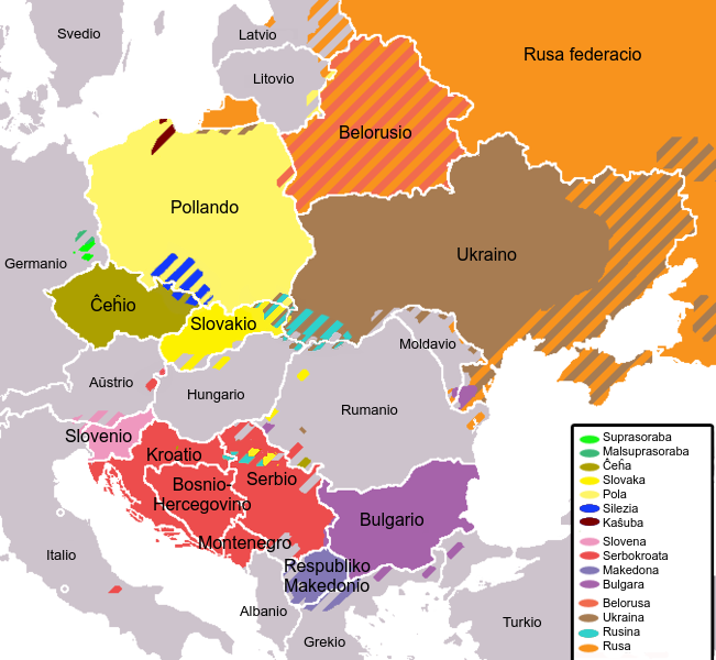 Piemontèis: Slava lingvaro